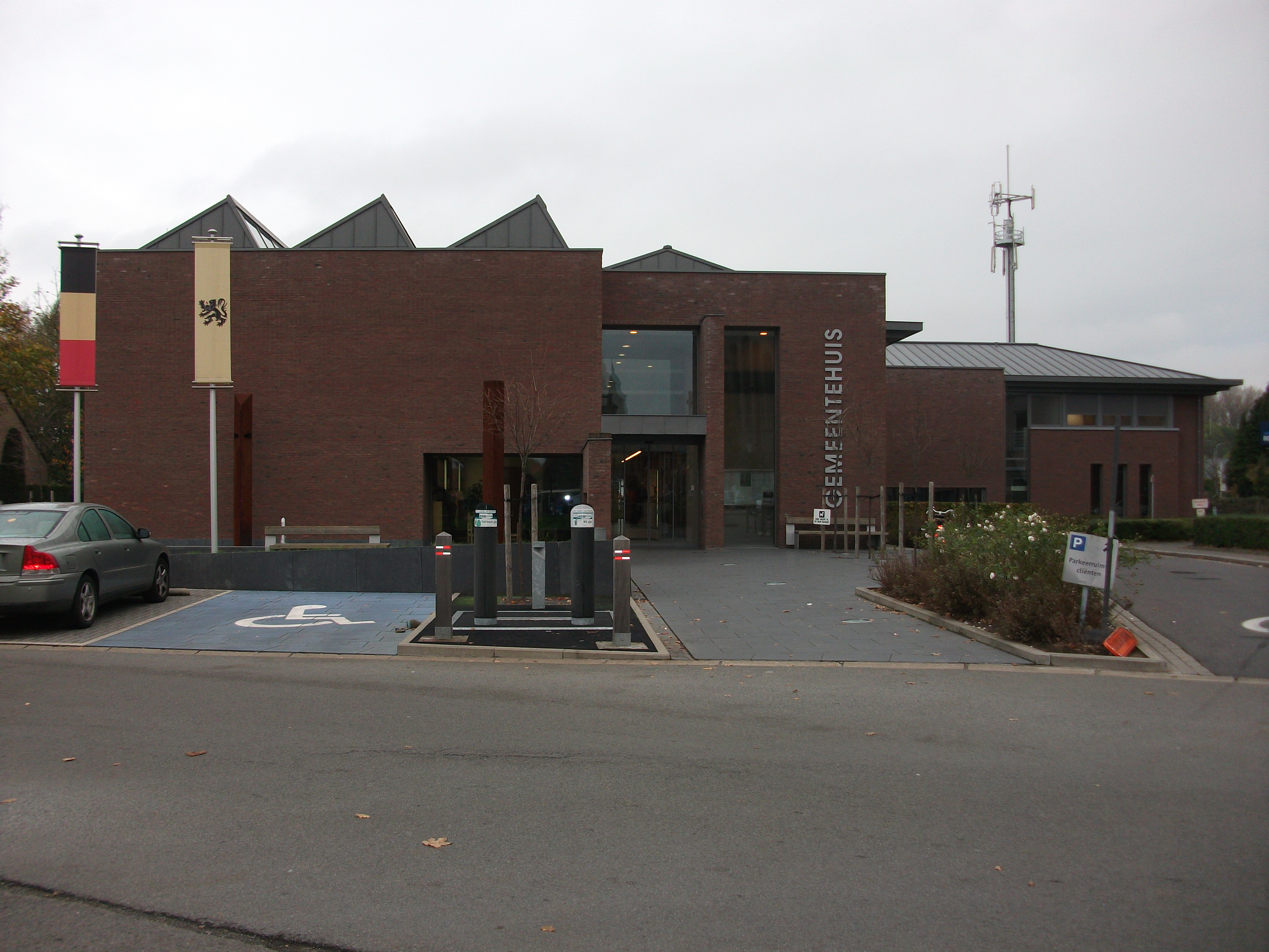 West-Vlams: 't Gemêentuus van Ardôoie